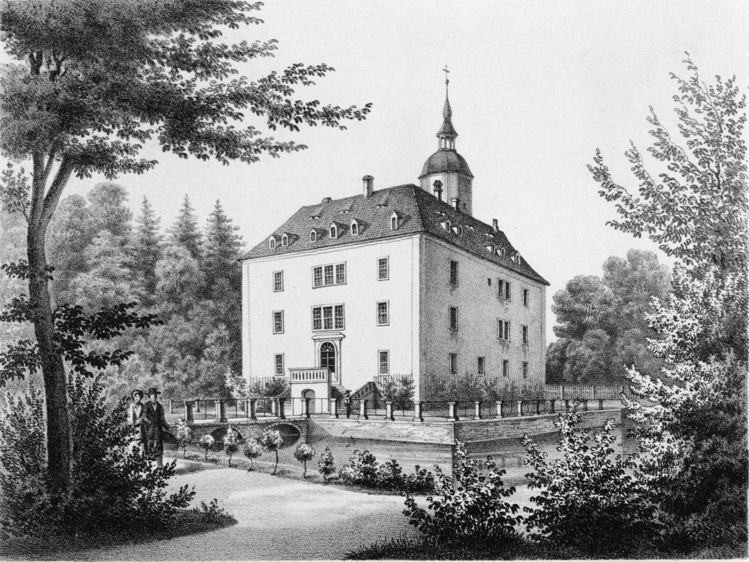 Schloss Seerhausen um 1860